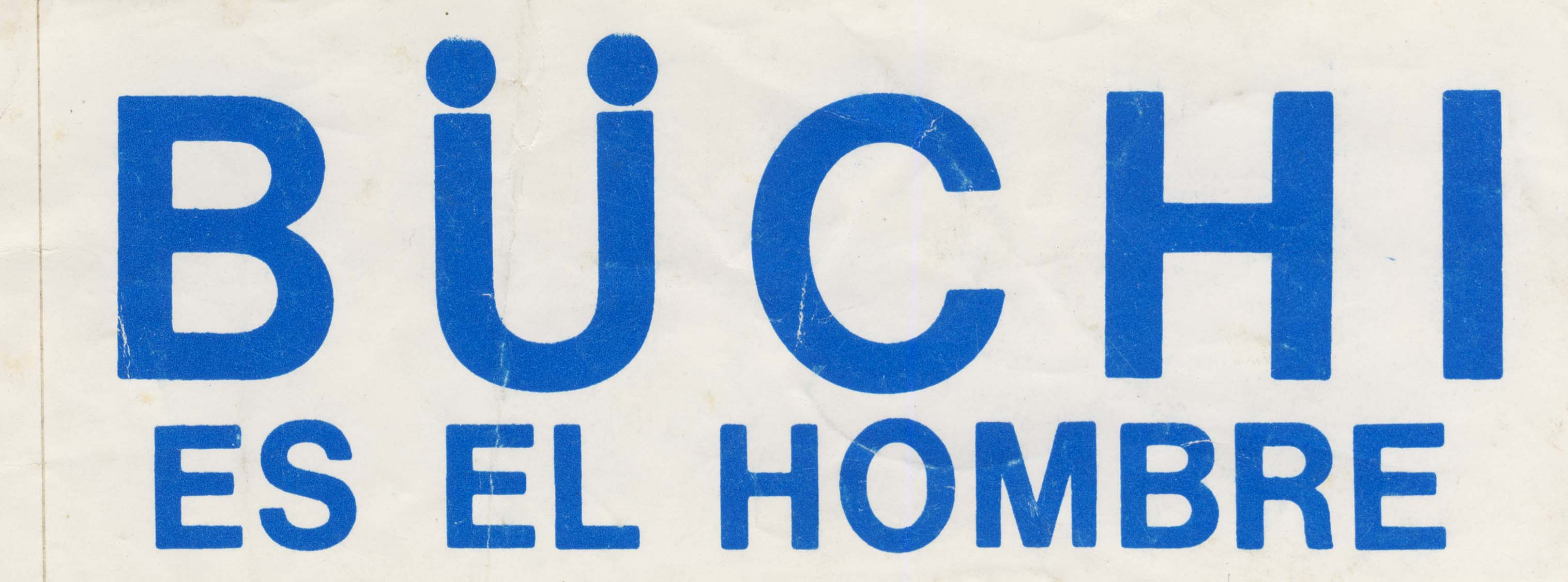 Büchi es el hombre, panfleto publicado durante la campaña presidencial de Chile de 1989.